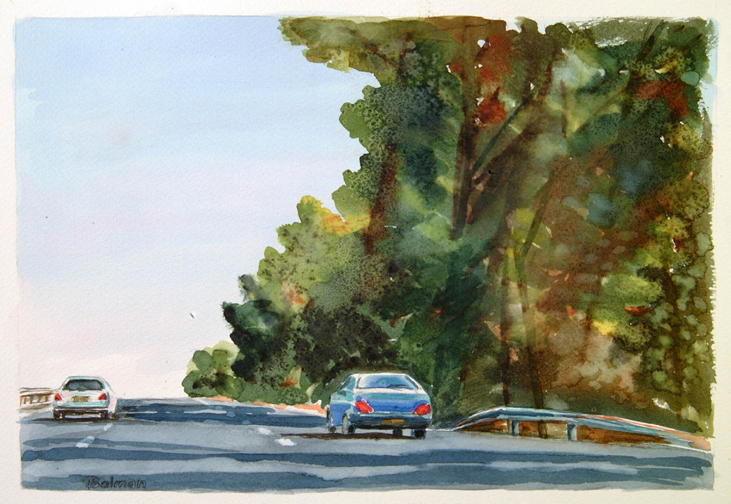 נוף עם מכונית